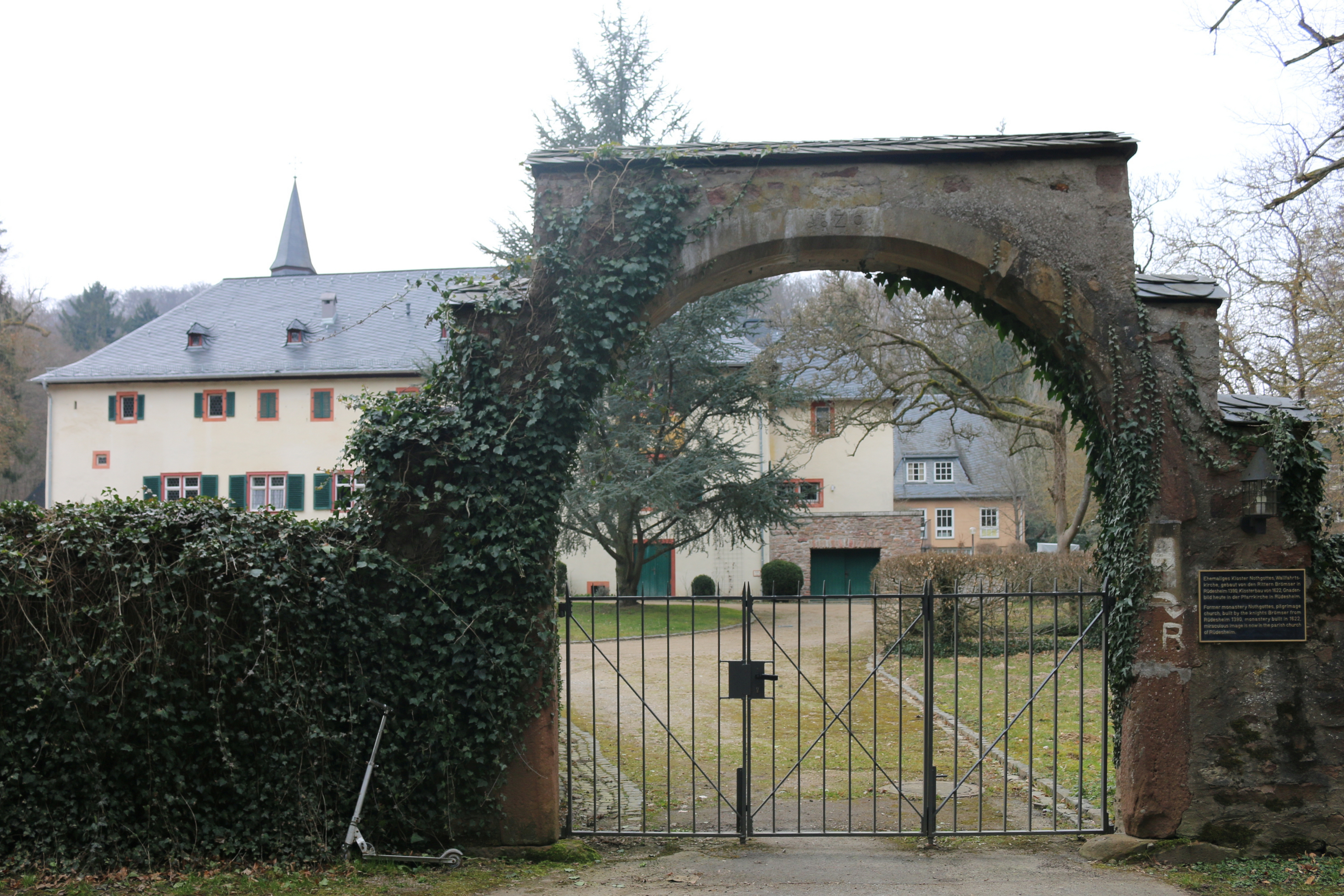 Rüdesheim-Eibingen: Kloster Nothgottes